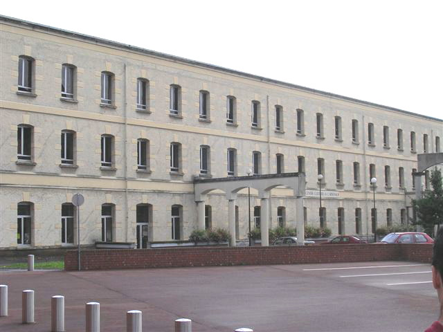 Arsenal Louis XIV de Maubeuge